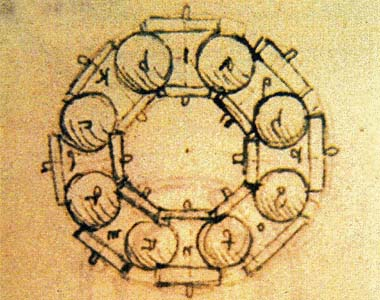 рисунок Леонардо да Винчи - Шарикоподшипники